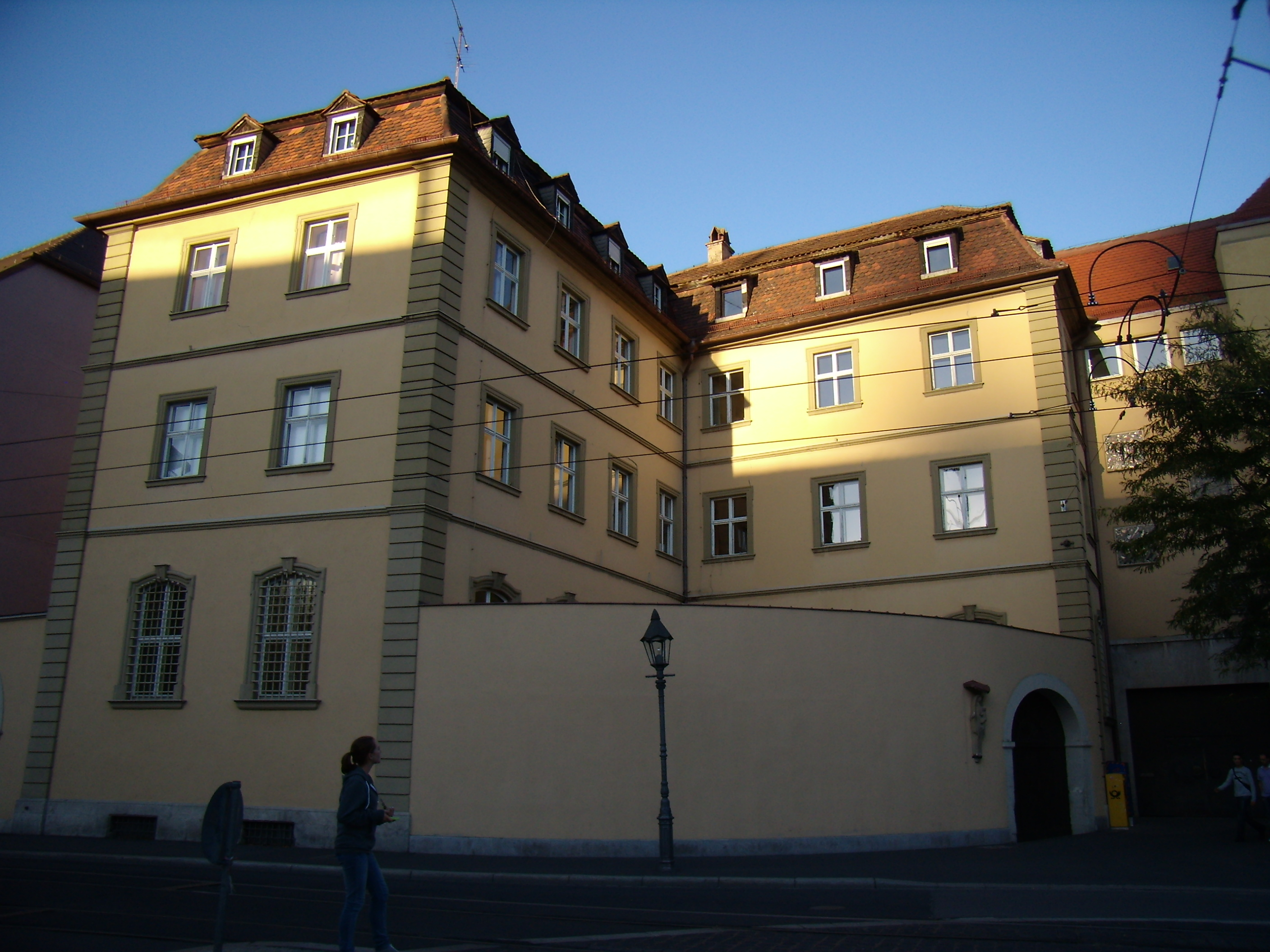 Würzburg - Augustinerstraße 17